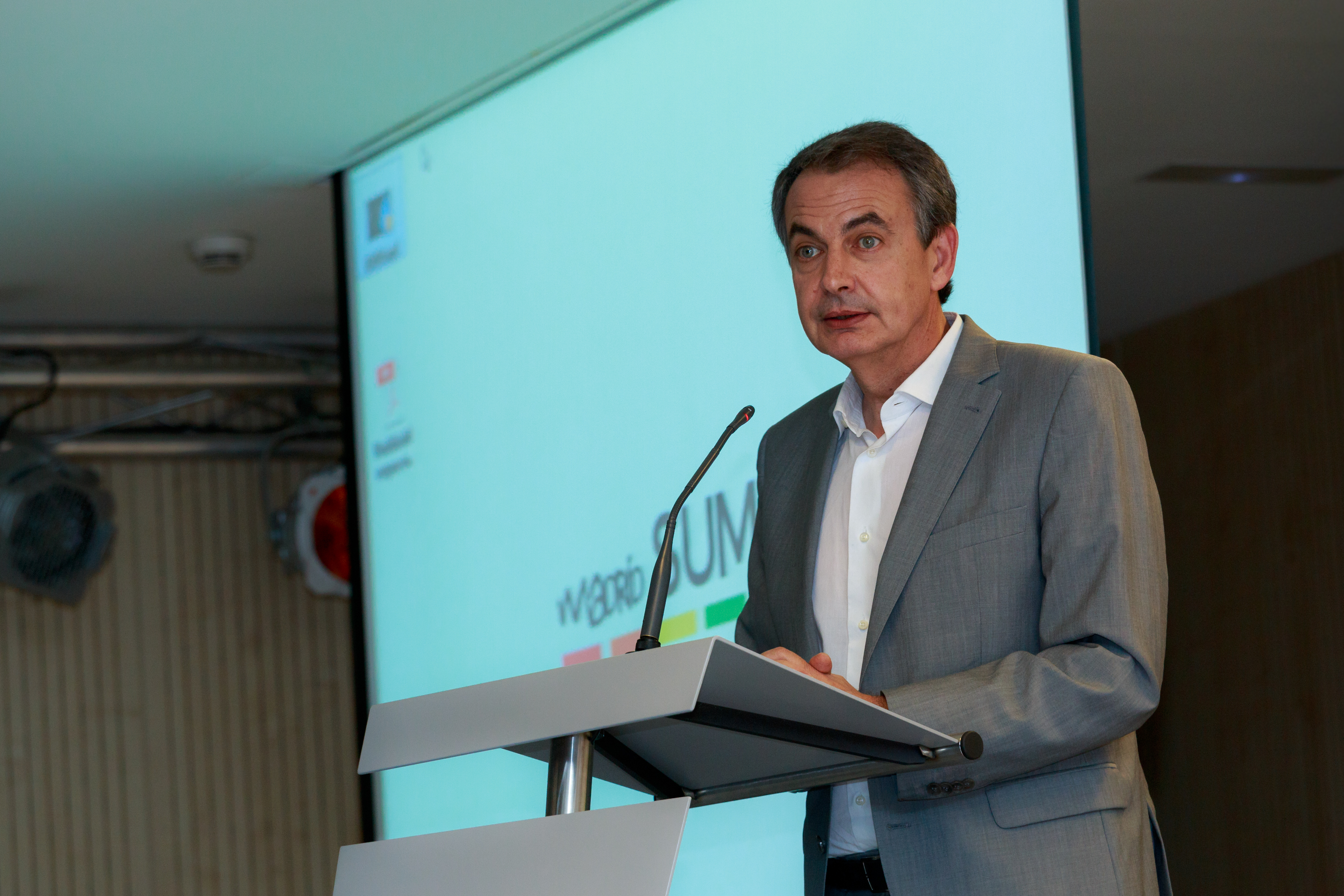 José Luis Rodríguez Zapatero. Madrid Summit. WorldPride 2017 Madrid.